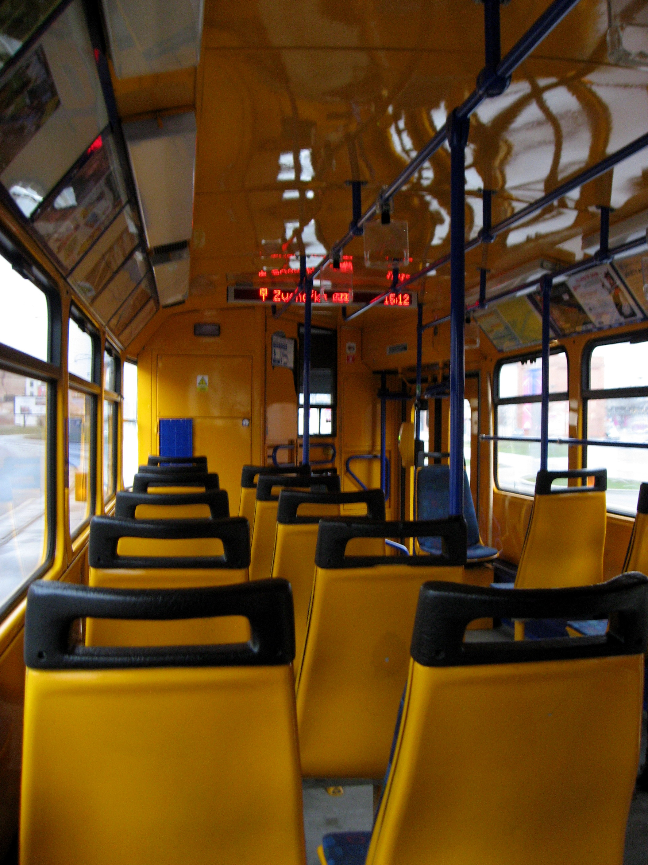 Interiér SA tramvaje